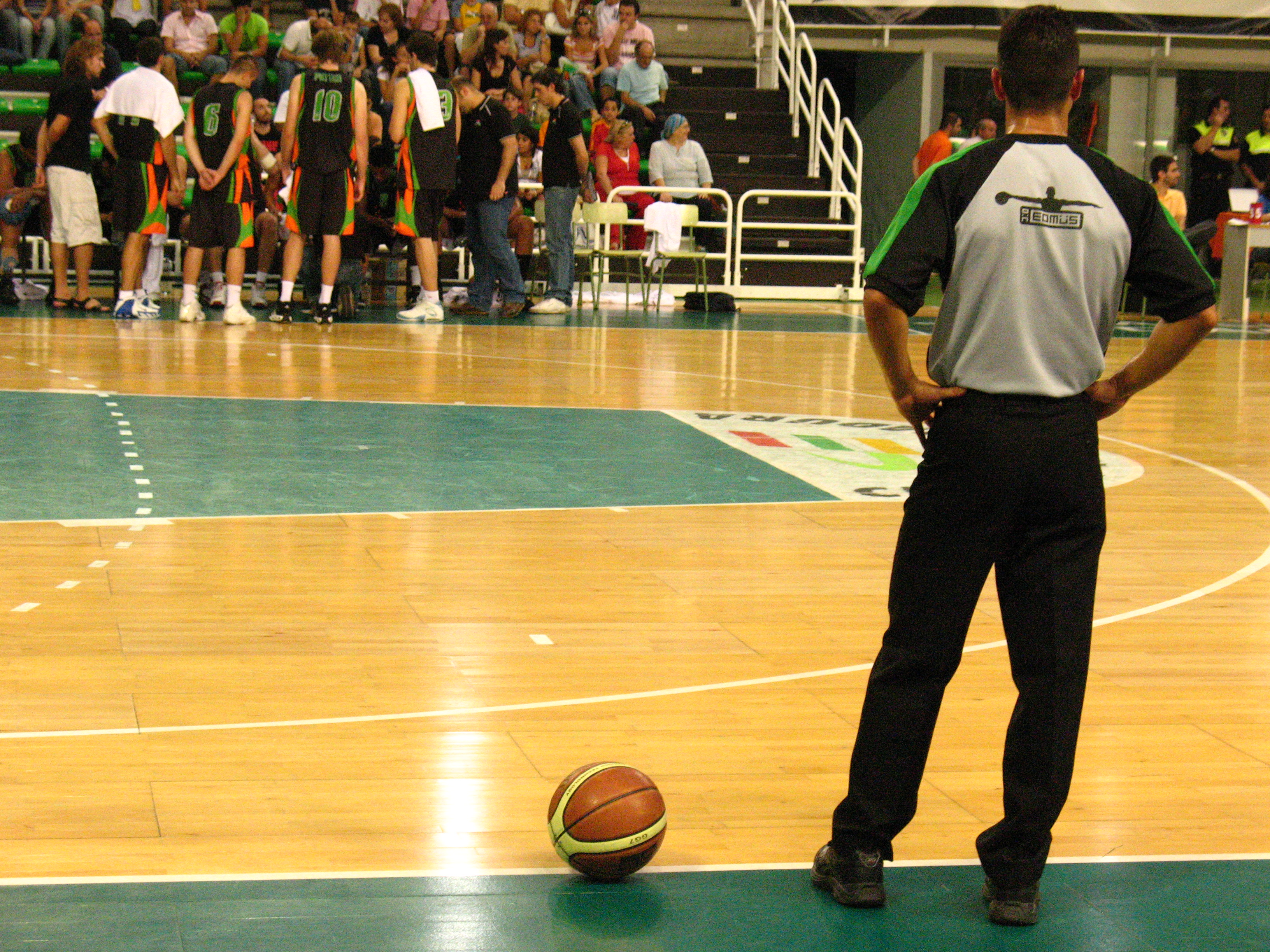 Árbitro esperando a que termine un tiempo muerto en el partido Cáceres-Oporto del trofeo Cáceres Patrimonio de la humanidad 2007